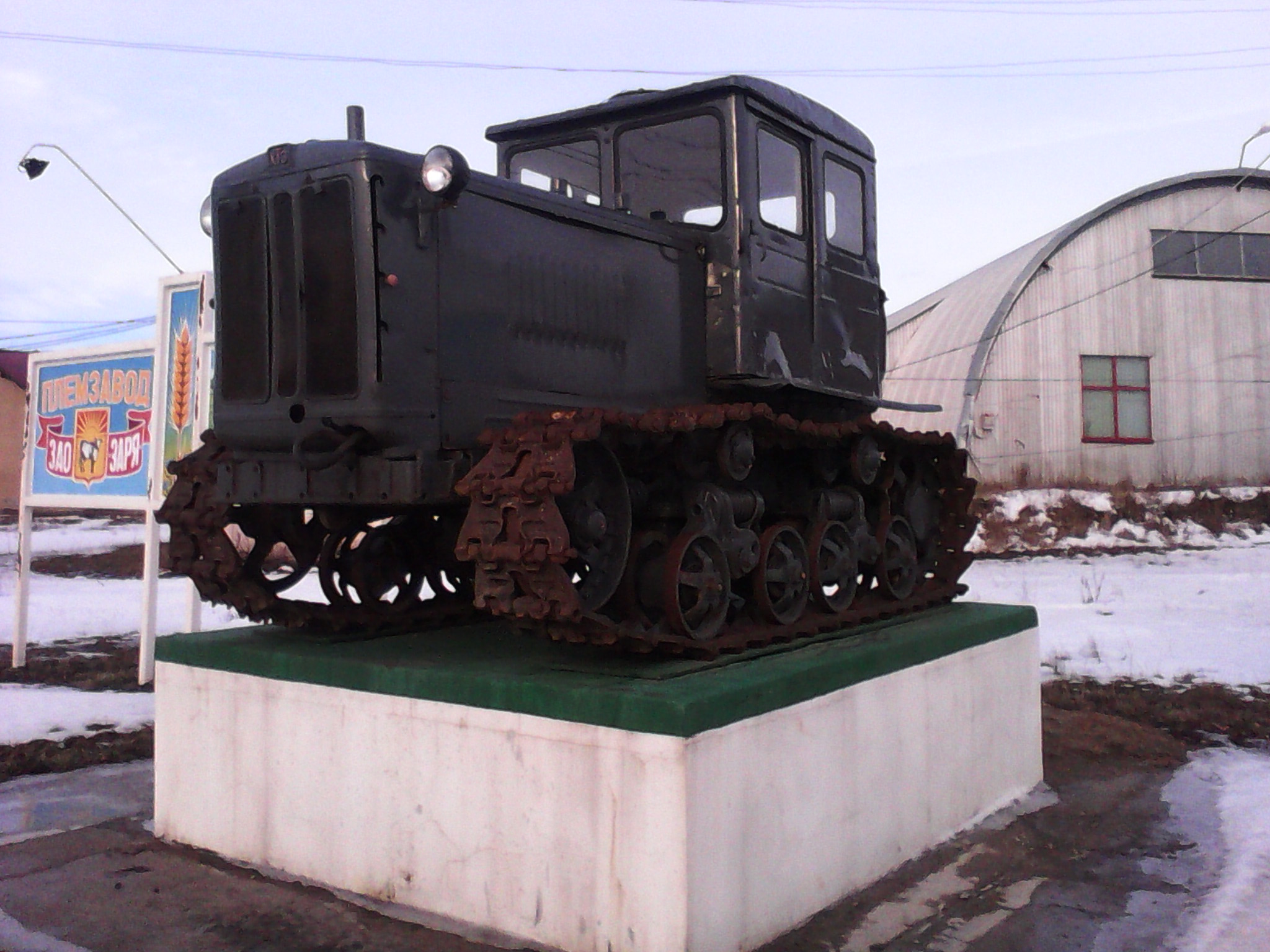 Сталинец